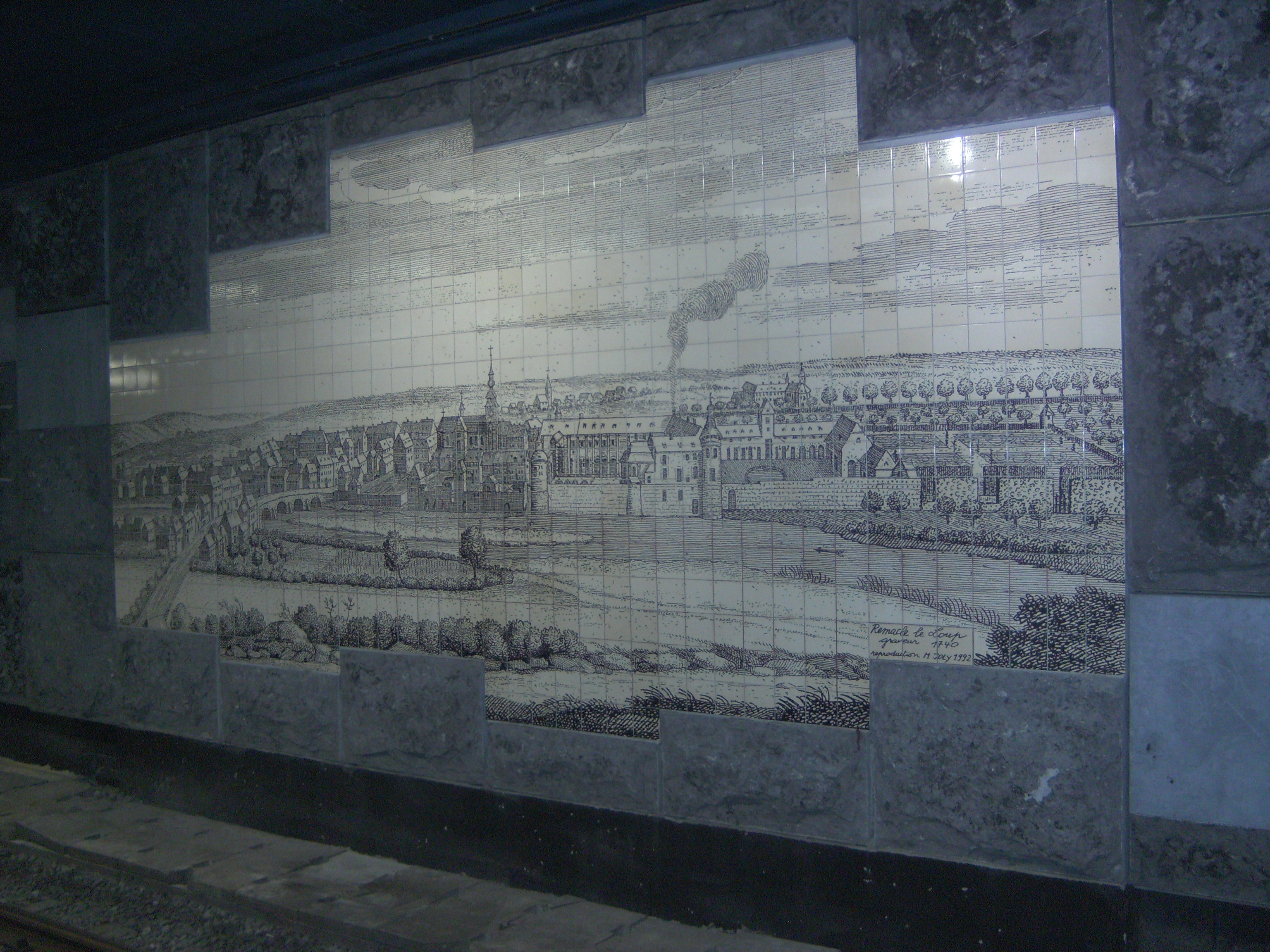 De Cartier (métro de Charleroi) - reproduction d'une gravure de Remacle Le Loup